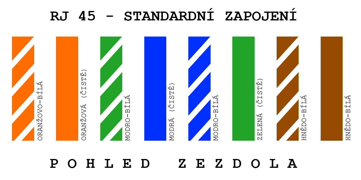 Pohled zezdola na STANDARDNÍ zapojení konektoru RJ45